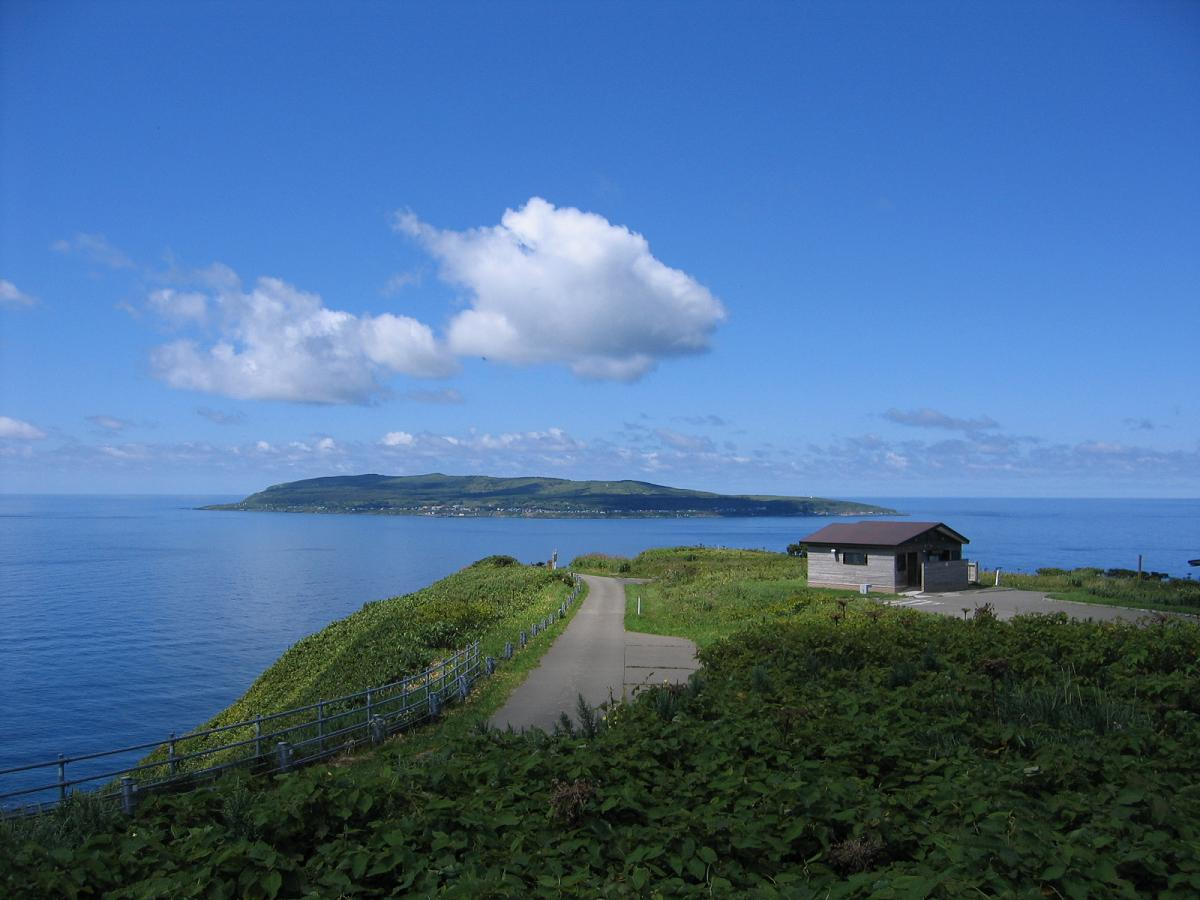 焼尻島から見る天売島（北海道苫前郡羽幌町）Teuri Island, Haboro, Hokkaidō, Japan